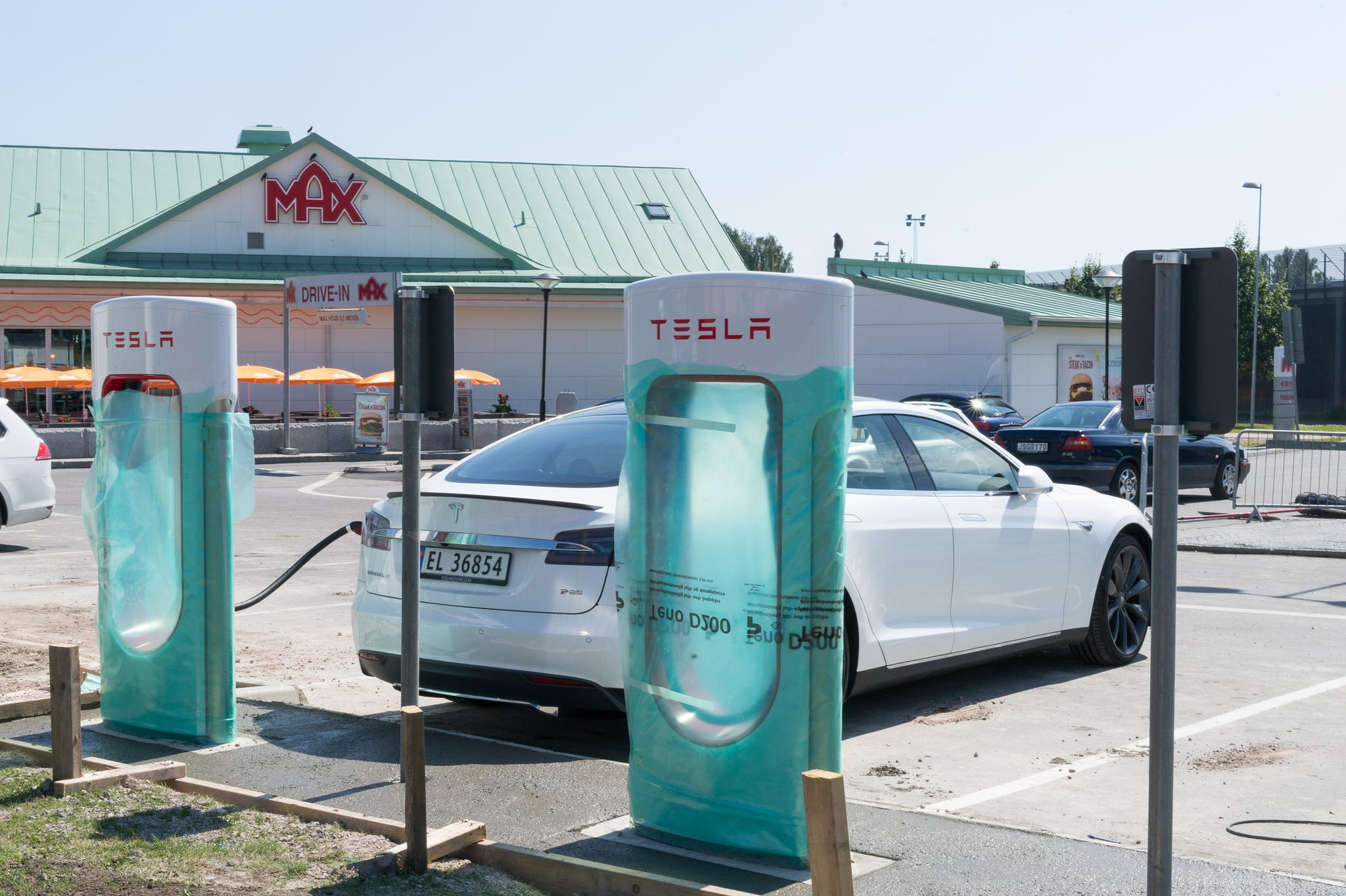 Суперзарядка в Карлстаде